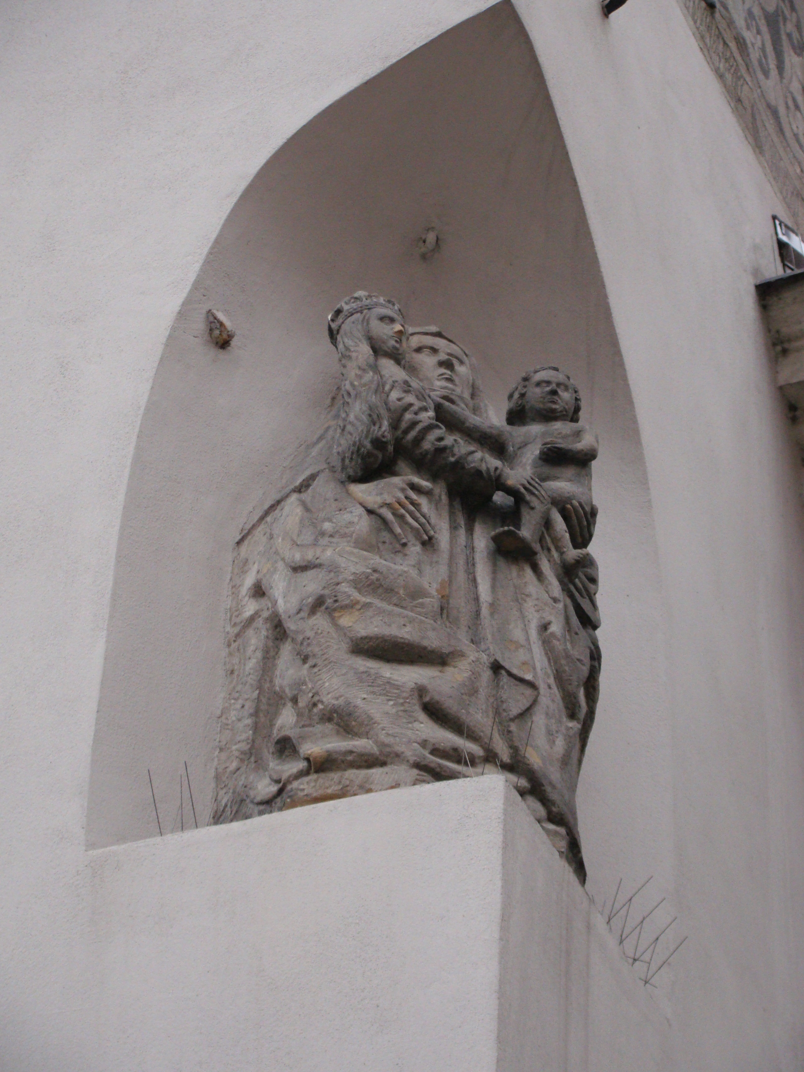 Figurka św. Anny Samotrzeć